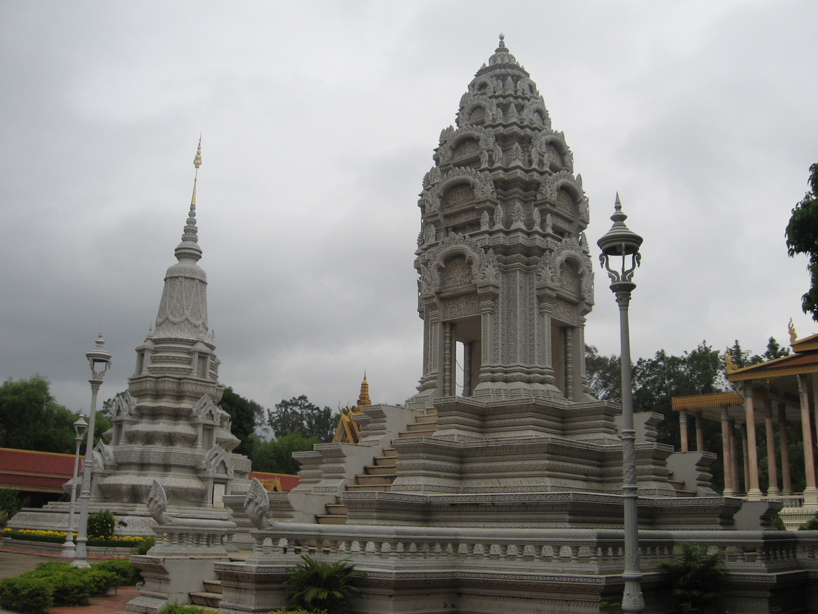 Mộ công chúa trong Hoàng Cung -Phan Minh Châu chụp tại Hoàng Cung